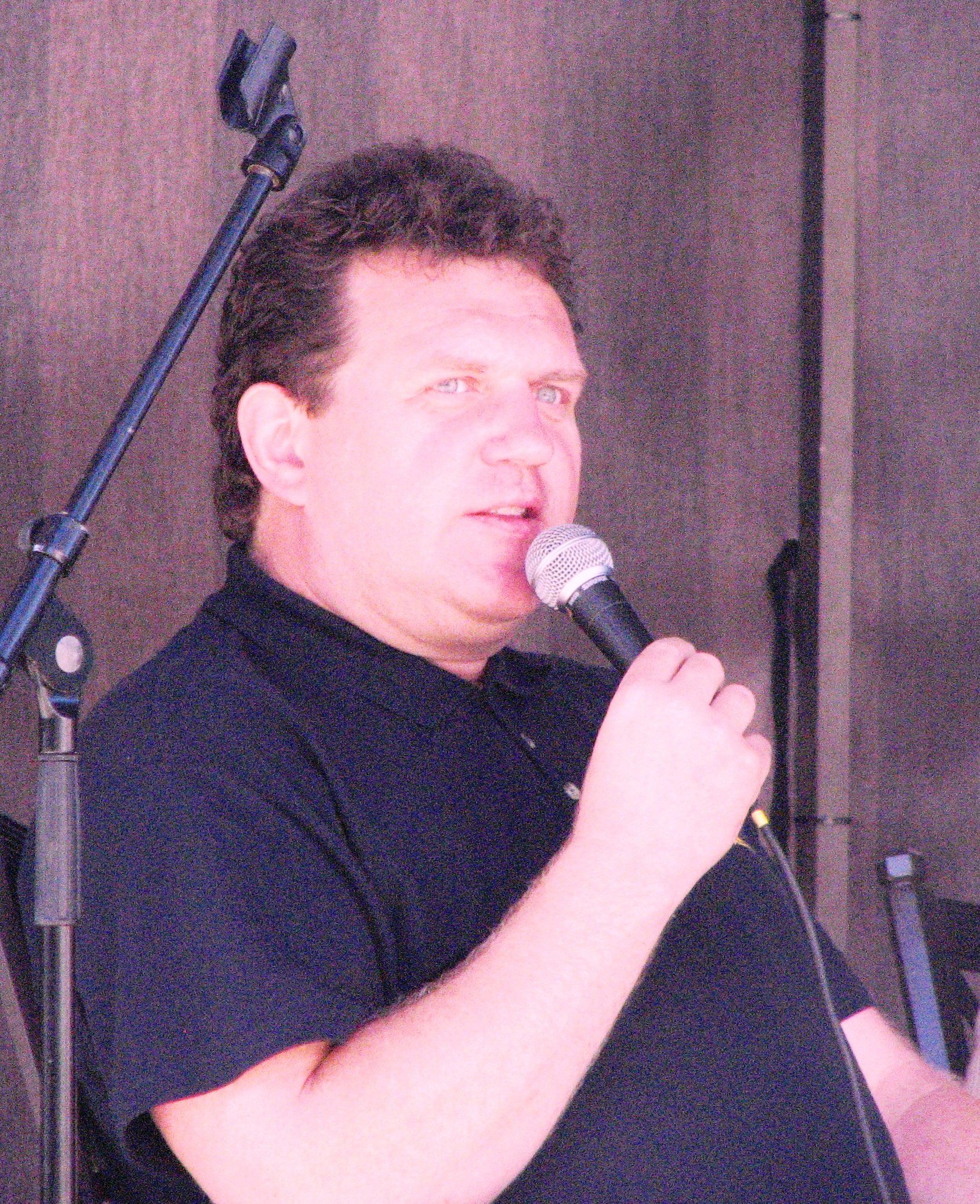 Jüri Leiten esinemas Kuressaare Arensburgi ooperikohvikus